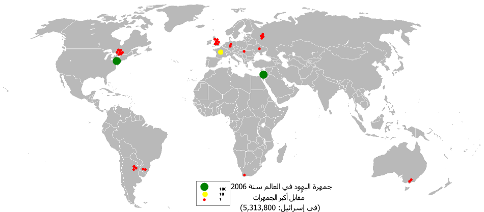 الجمهرة العالميَّة لليهود في سنة 2006 مُقارنةً مع نسبة الدولة الأم وهي إسرائيل (5,313,800).